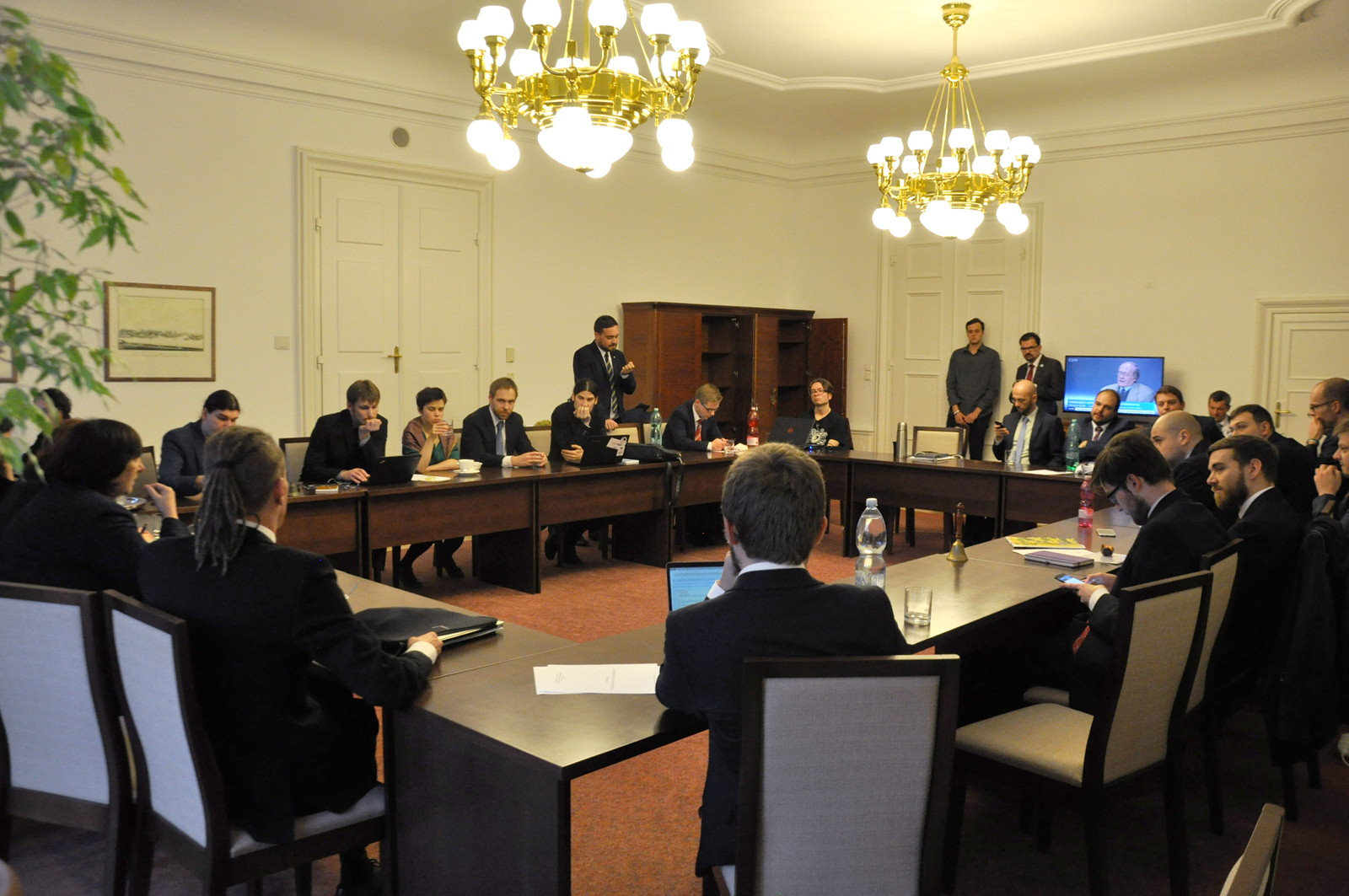 Zasedání poslaneckého klubu České pirátské strany v kanceláři klubu ve Šternberském paláci na Malostranském náměstí.